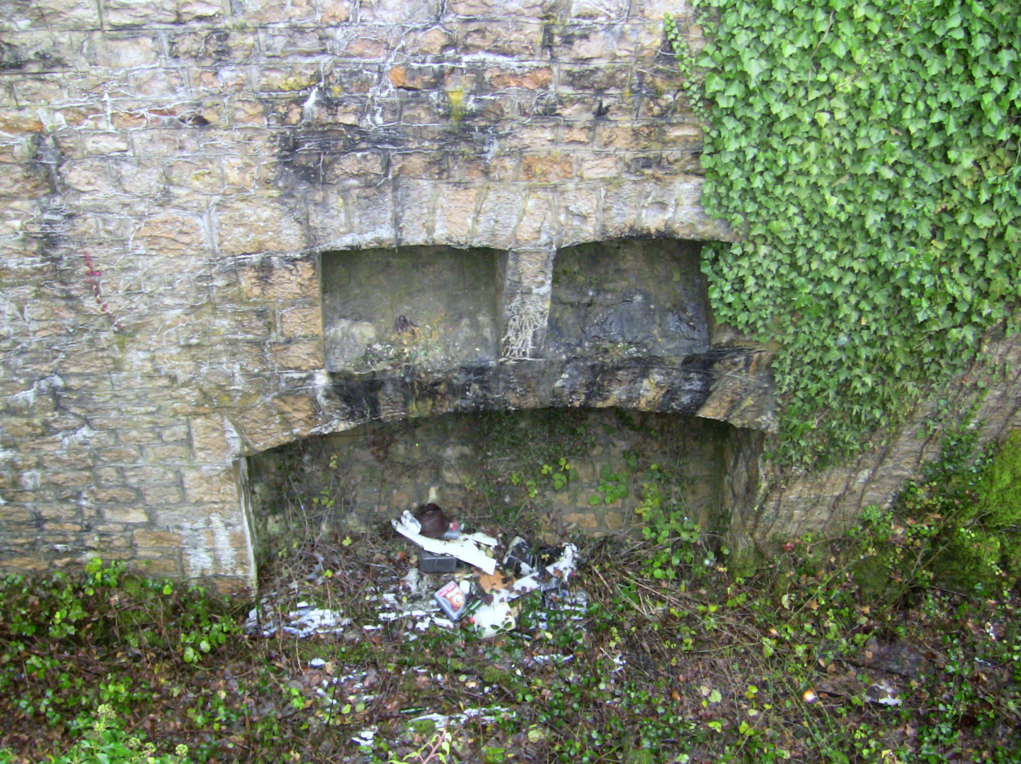 Un créneau-mâchicoulis du fort de Planoise, à Besançon (Doubs, France).